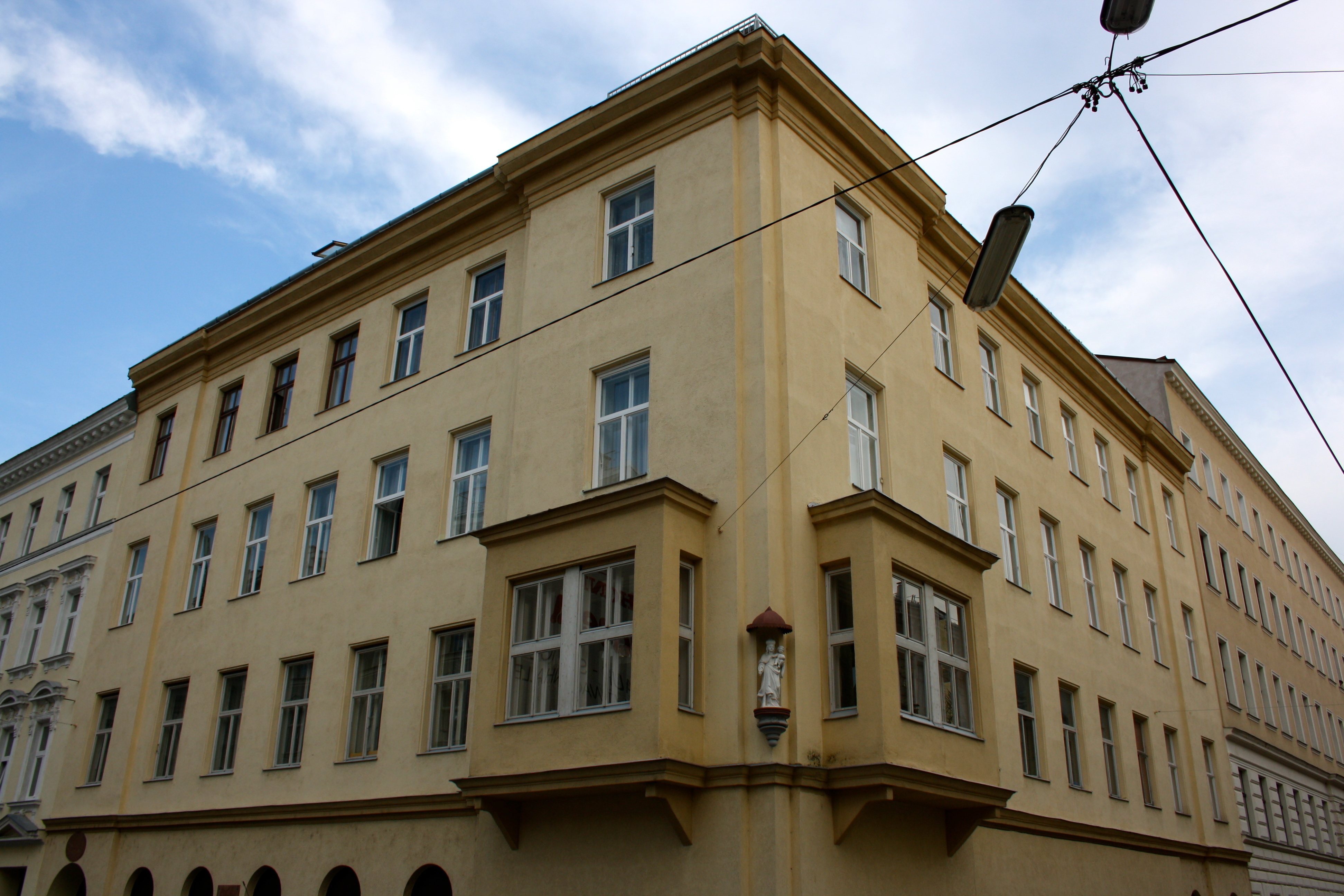 Liebfrauenhaus, Anastasius-Grün-Gasse 25, 1180 Wien.